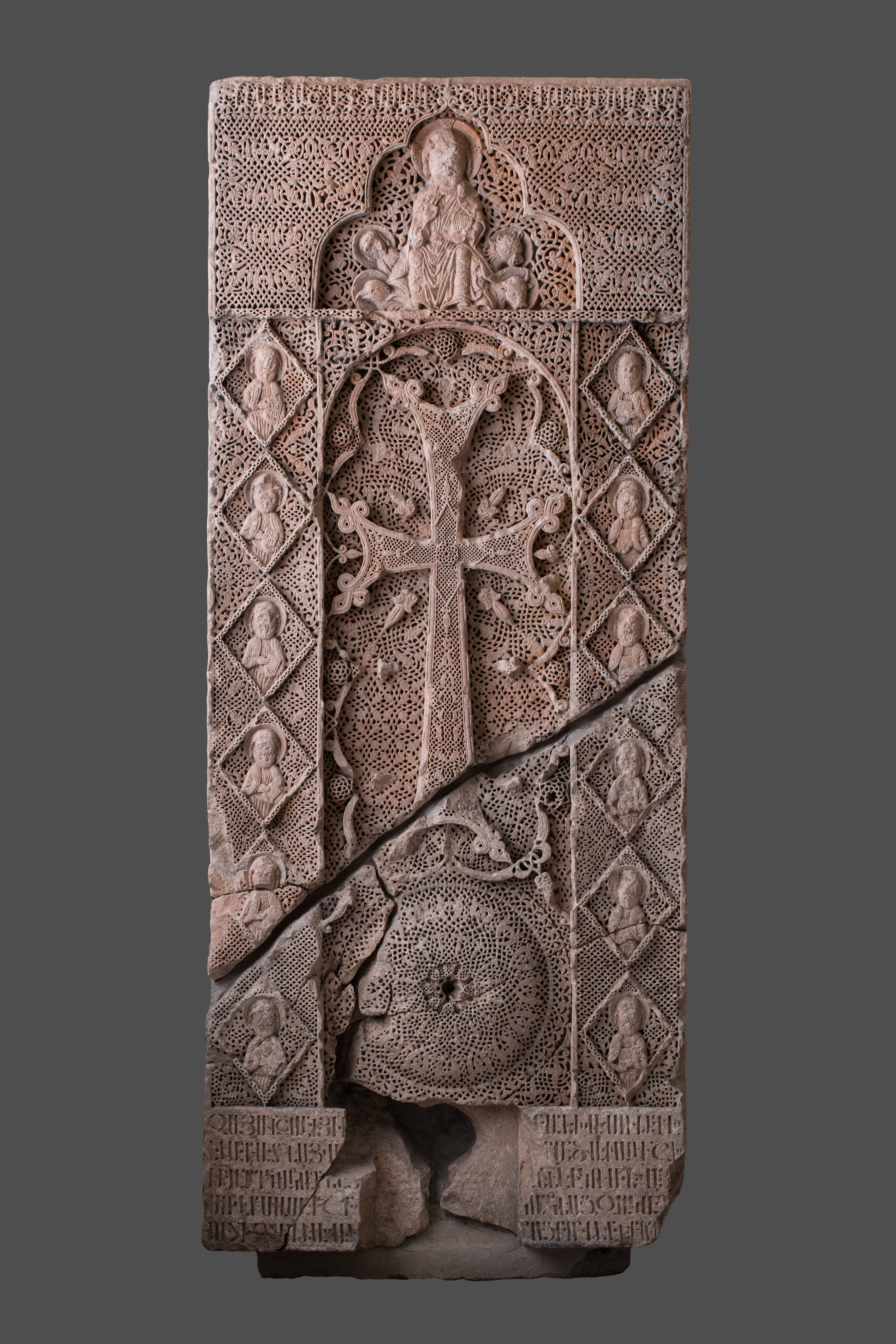 քար, 1300-1312թթ․, բերված է Նորավանքից